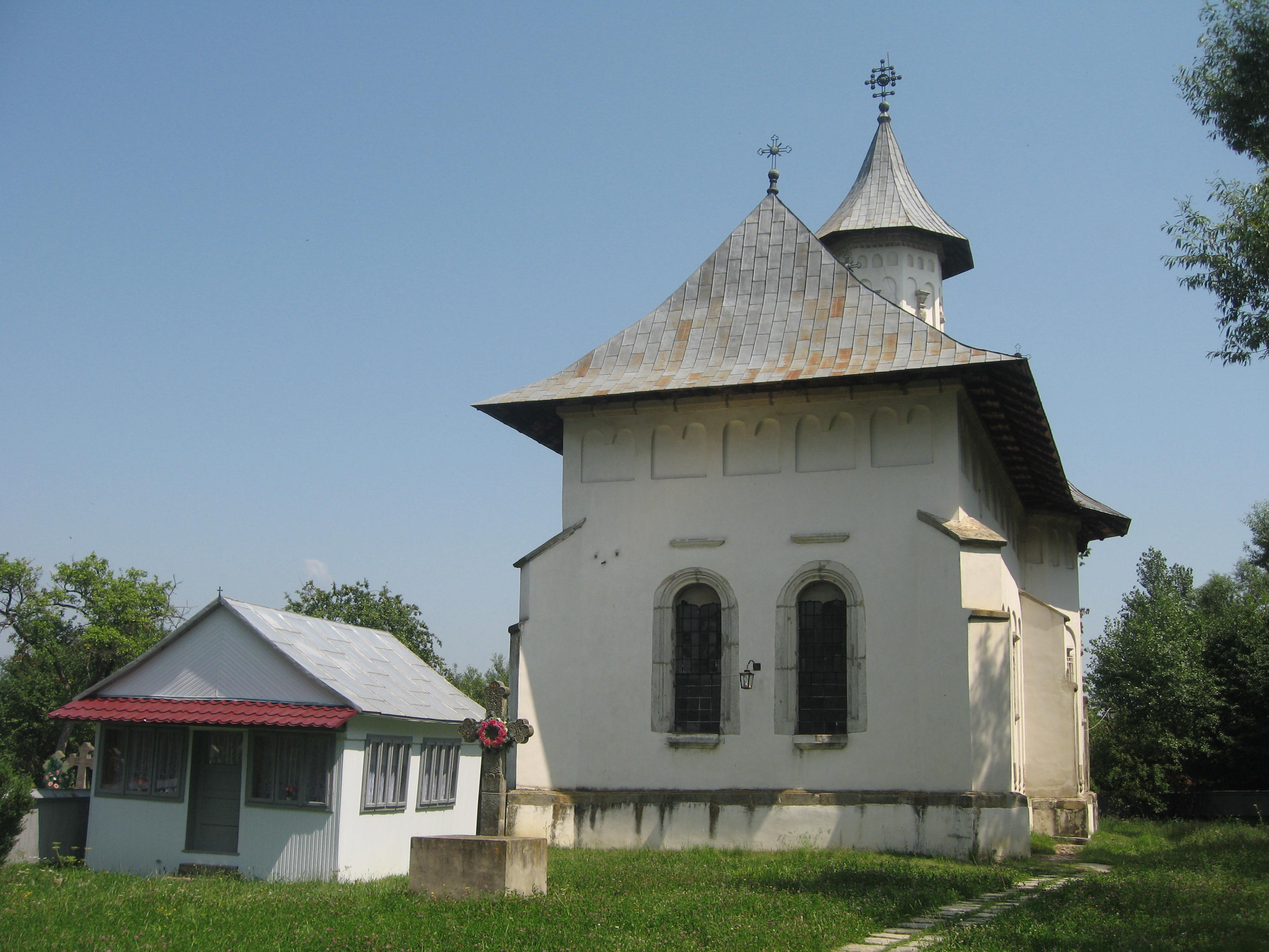 Biserica Sfântul Onufrie din Mănăstioara-Siret 01